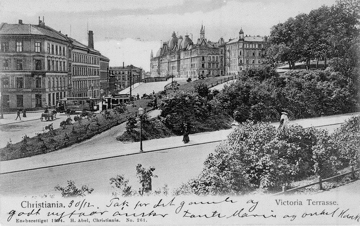 Victoria Terrasse, Nedre Slottsbakken ved den senere Abelhaugen (navn fra 1908). Trikk opp mot Drammensveien, hest og kjerre, spaserende. Gamle bygårder langs Ruseløkkveien. Postkort 261 med påskrevet hilsen.